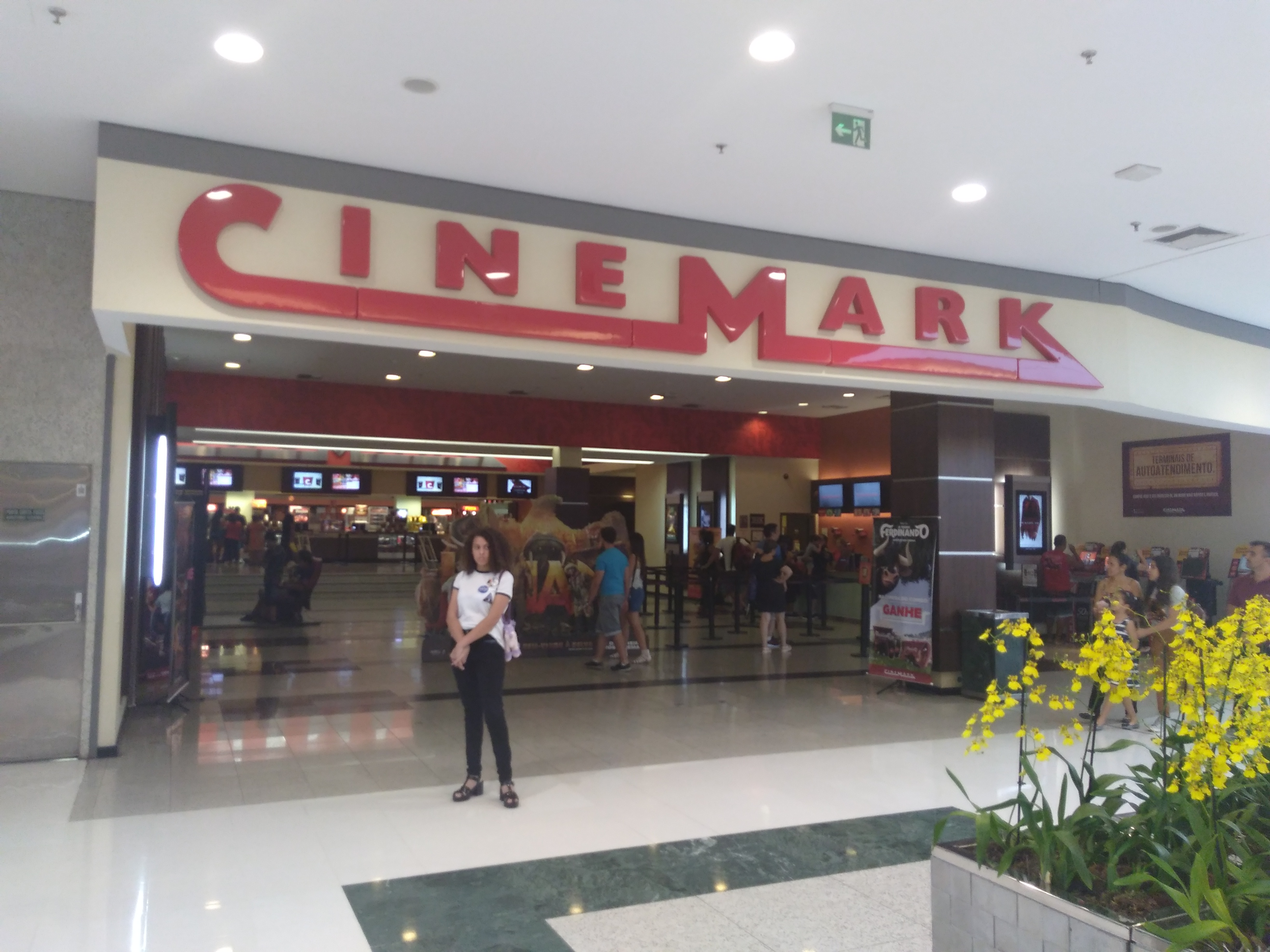 Área externa do Cinemark Barra Shopping Sul de Porto Alegre